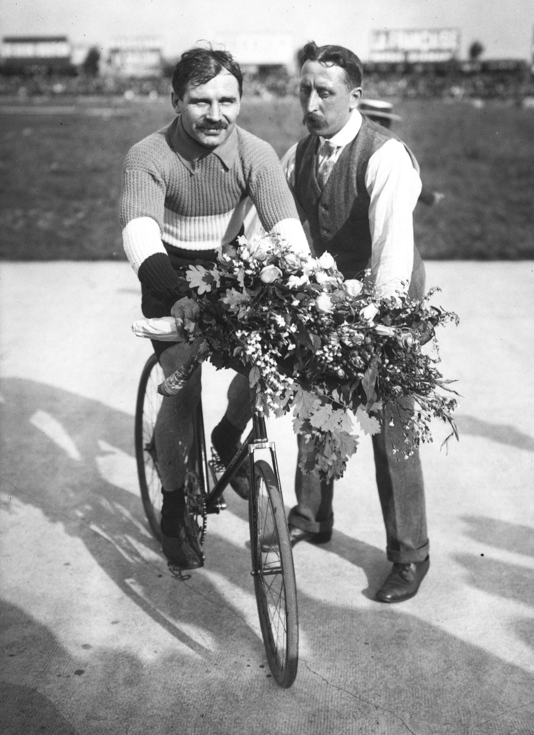 Guignard, champion de France des 100 kilomètres sur piste, Parc des Princes, 9-6-12